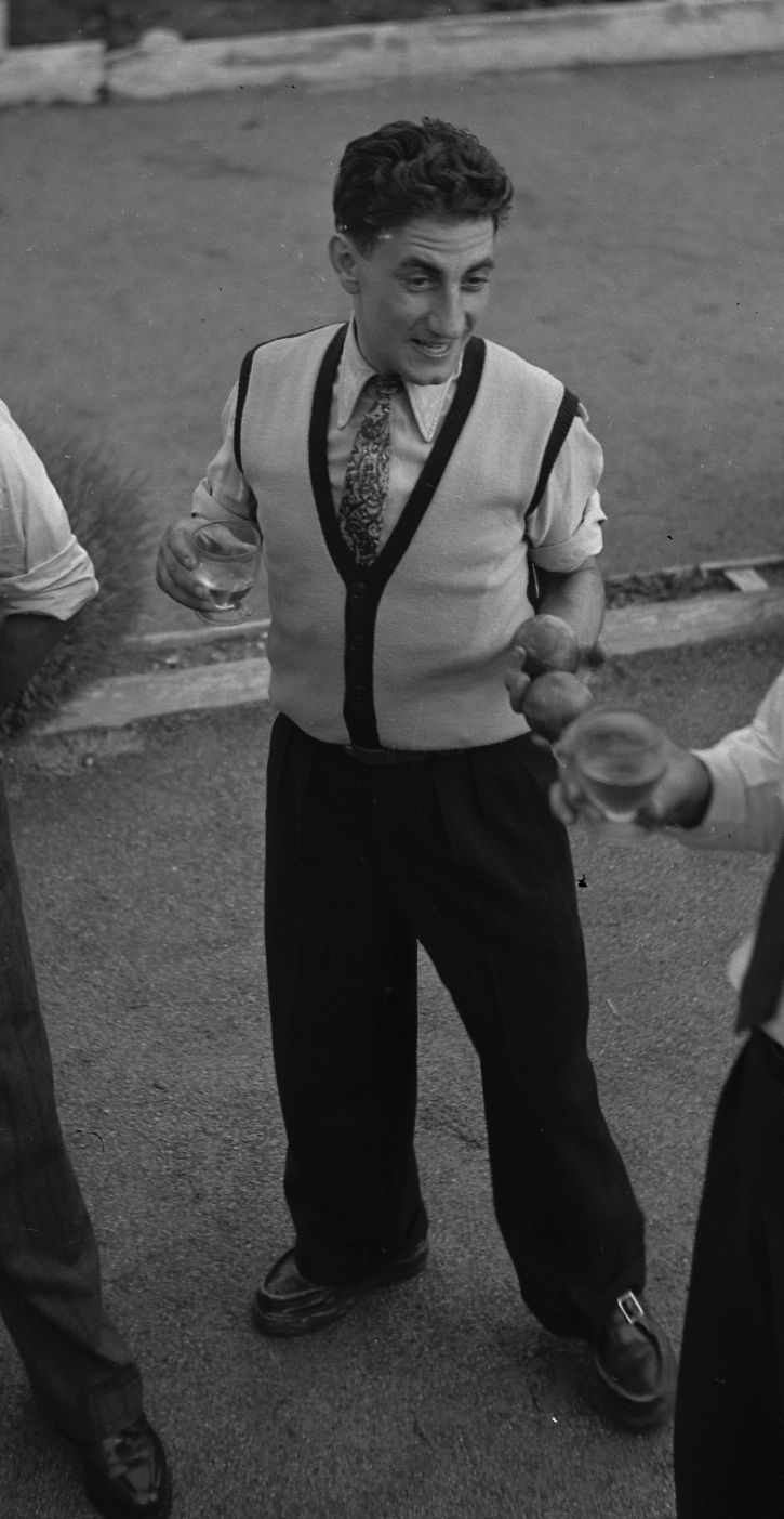 Boulodrome à Toulouse. 13-14 Juillet 1949. Vue de quatre hommes verre à la main ; de gauche à droite : les cyclistes René Vietto, Jean-Apôtre dit "Apo" Lazarides, Lucien Teisseire et Jean Robic lors d'une partie de pétanque.